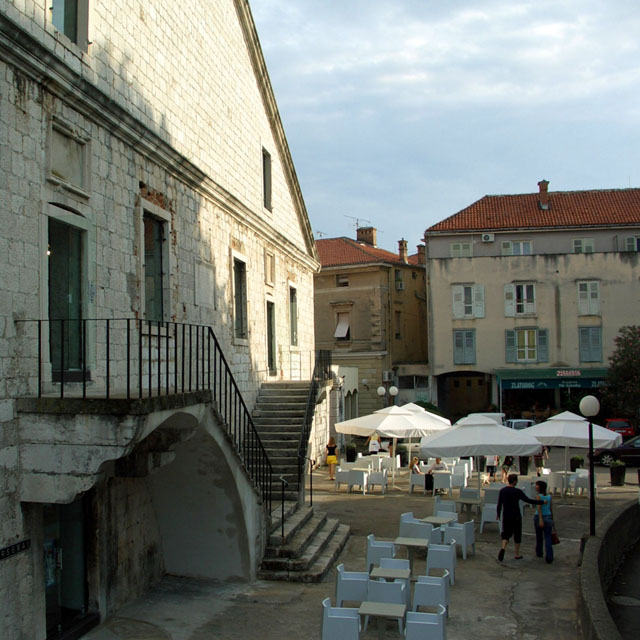 Arsenal, Zadar